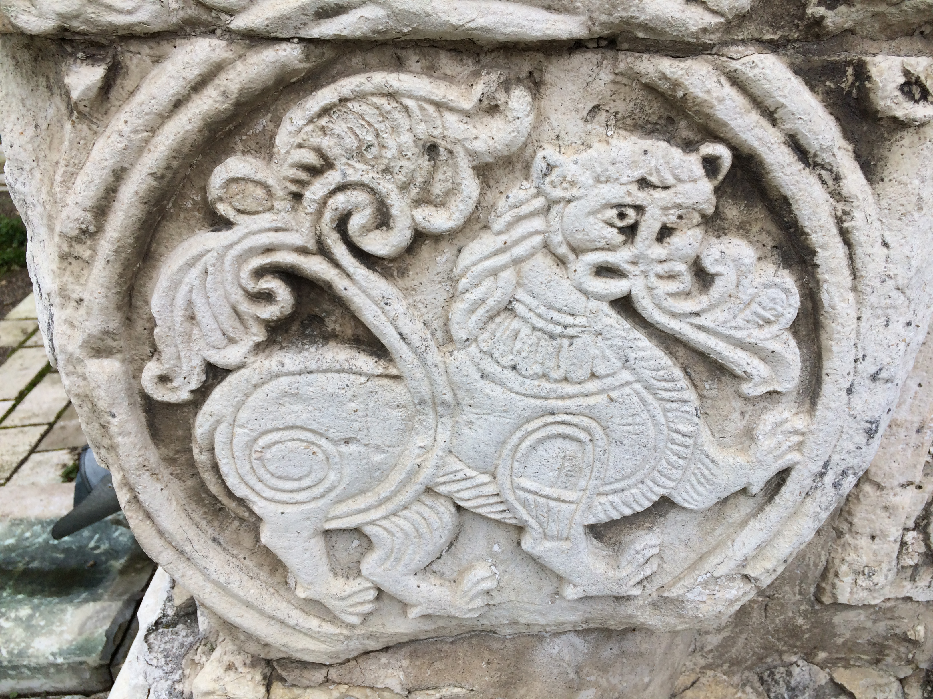 Собор Георгиевский (Георгиевский собор и земляные валы городища): улица 1 Мая, Юрьев-Польский, Юрьев-Польский район, Владимирская область